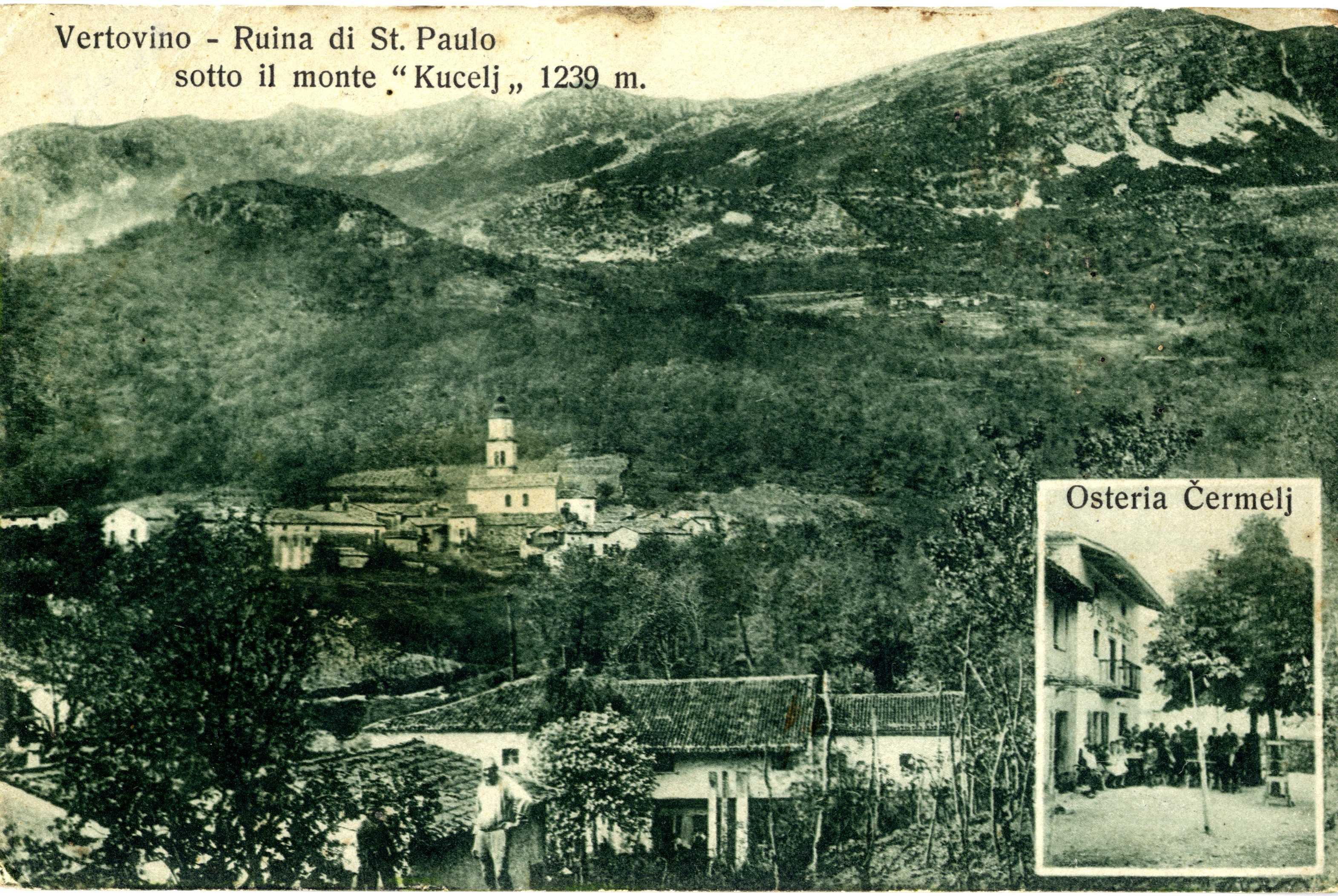 Vrtovin